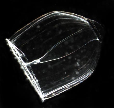 Hydromedusae Aglantha Digitale Bild: NOAA, [1] The hydomedusae Aglantha digitale. (Photos by Kevin Raskoff, MBARI.)